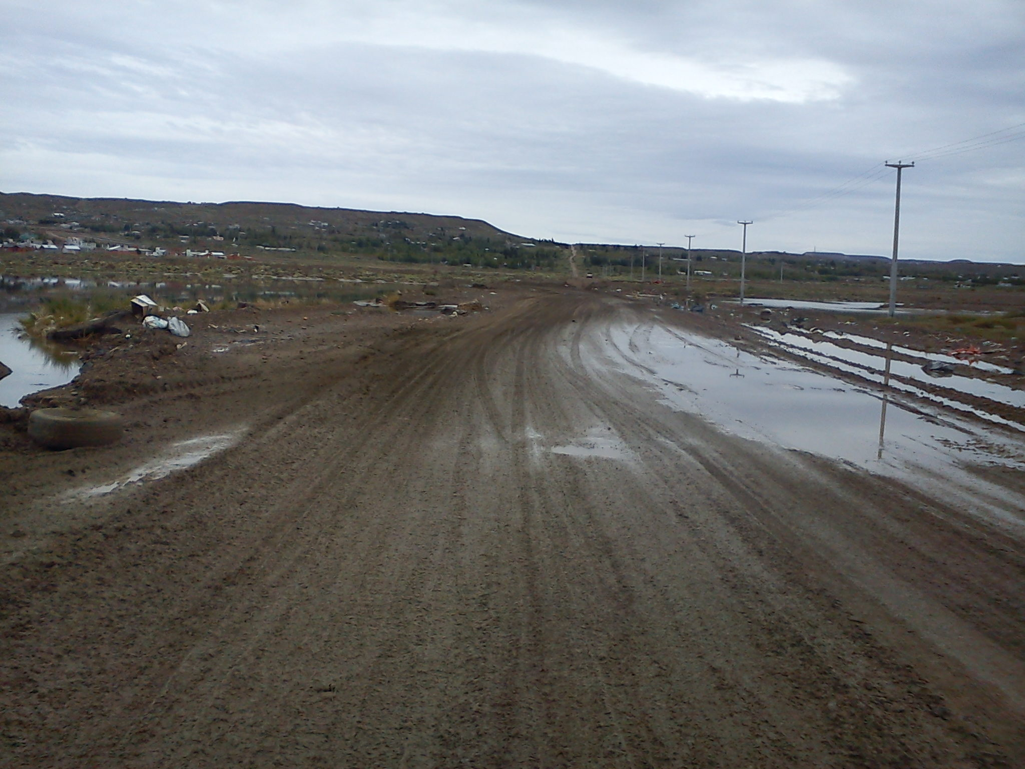 Calle que atraviesa el humedal CO